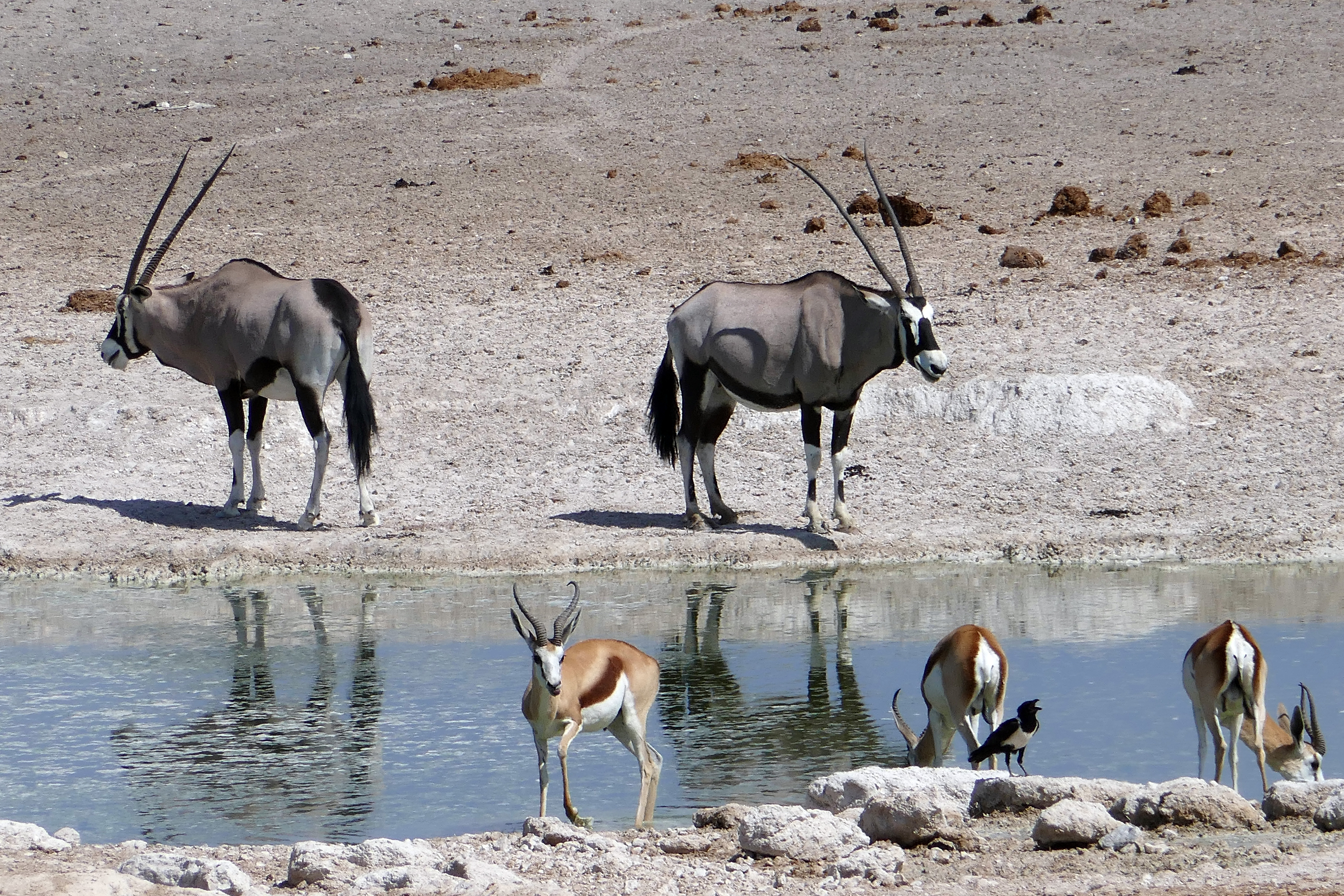 Oryx dans le parc national d'Etosha (Namibie).